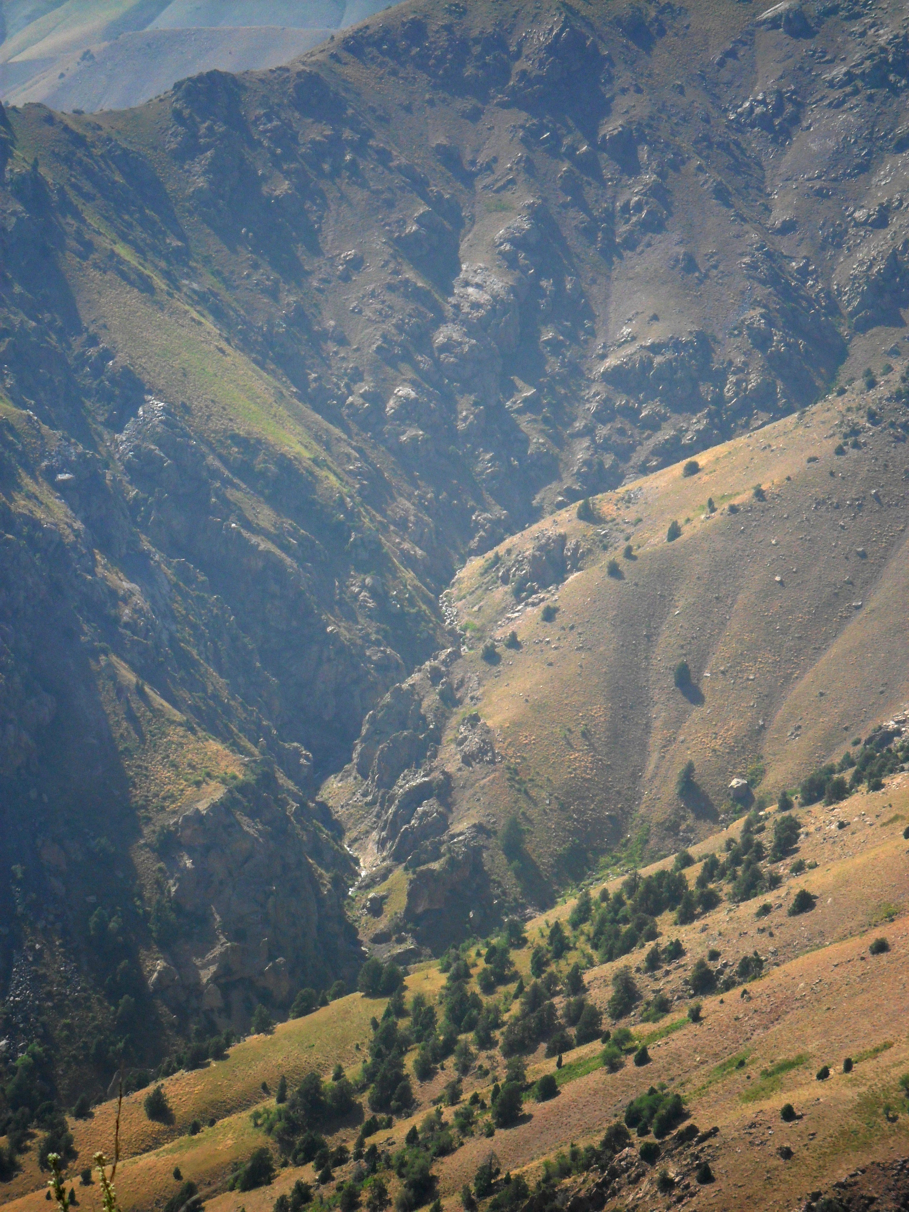 Долина Кырклысая перед слиянием с Кальтабараном. Ташкентская область, Республика Узбекистан